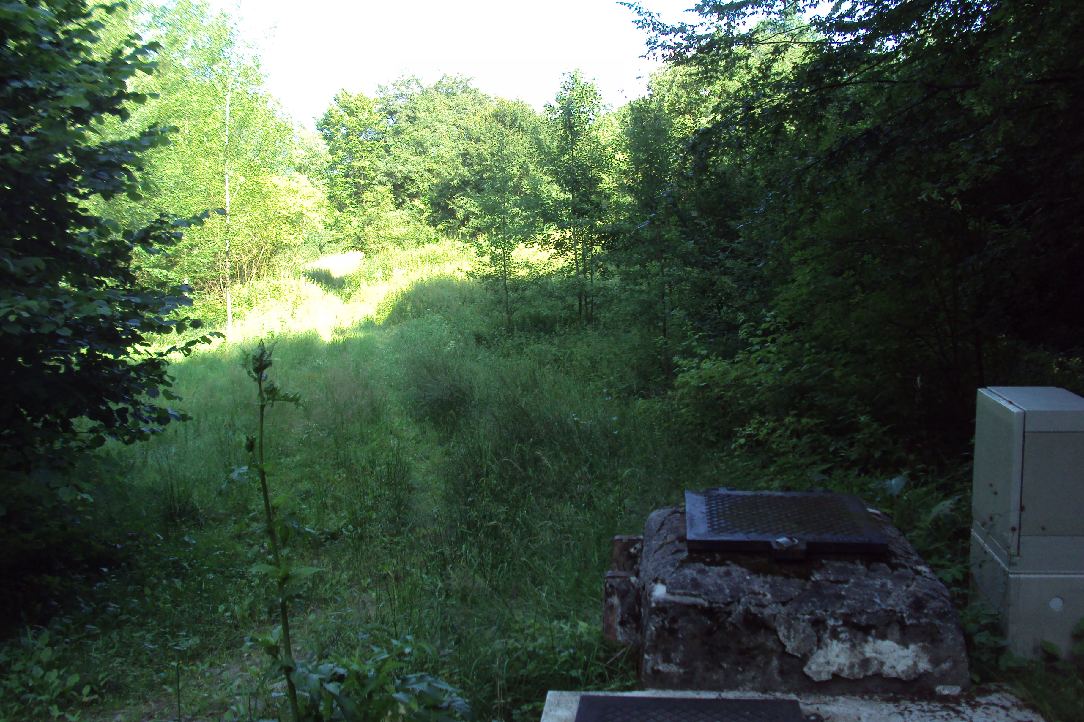 Přírodní památka Pod Hvězdou na Českolipsku